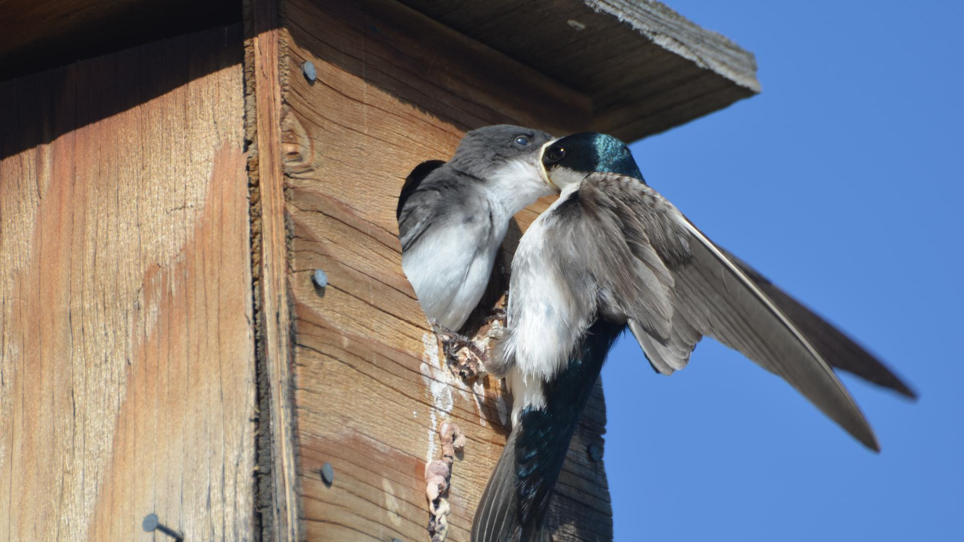 Oregon 2014